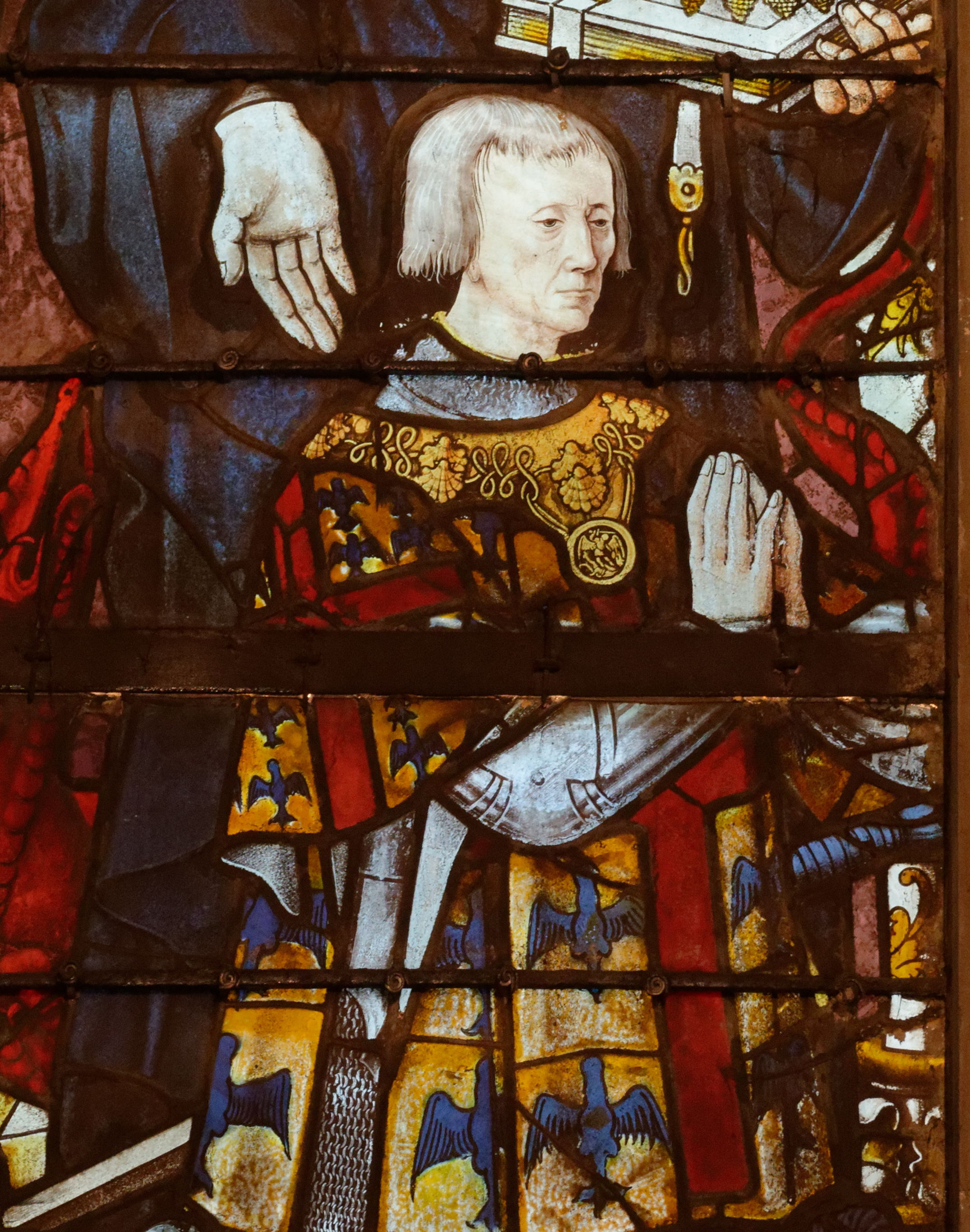 Guillaume de Montmorency présenté par saint Guillaume de Gellone, vitrail de la Collégiale Saint-Martin de Montmorency.